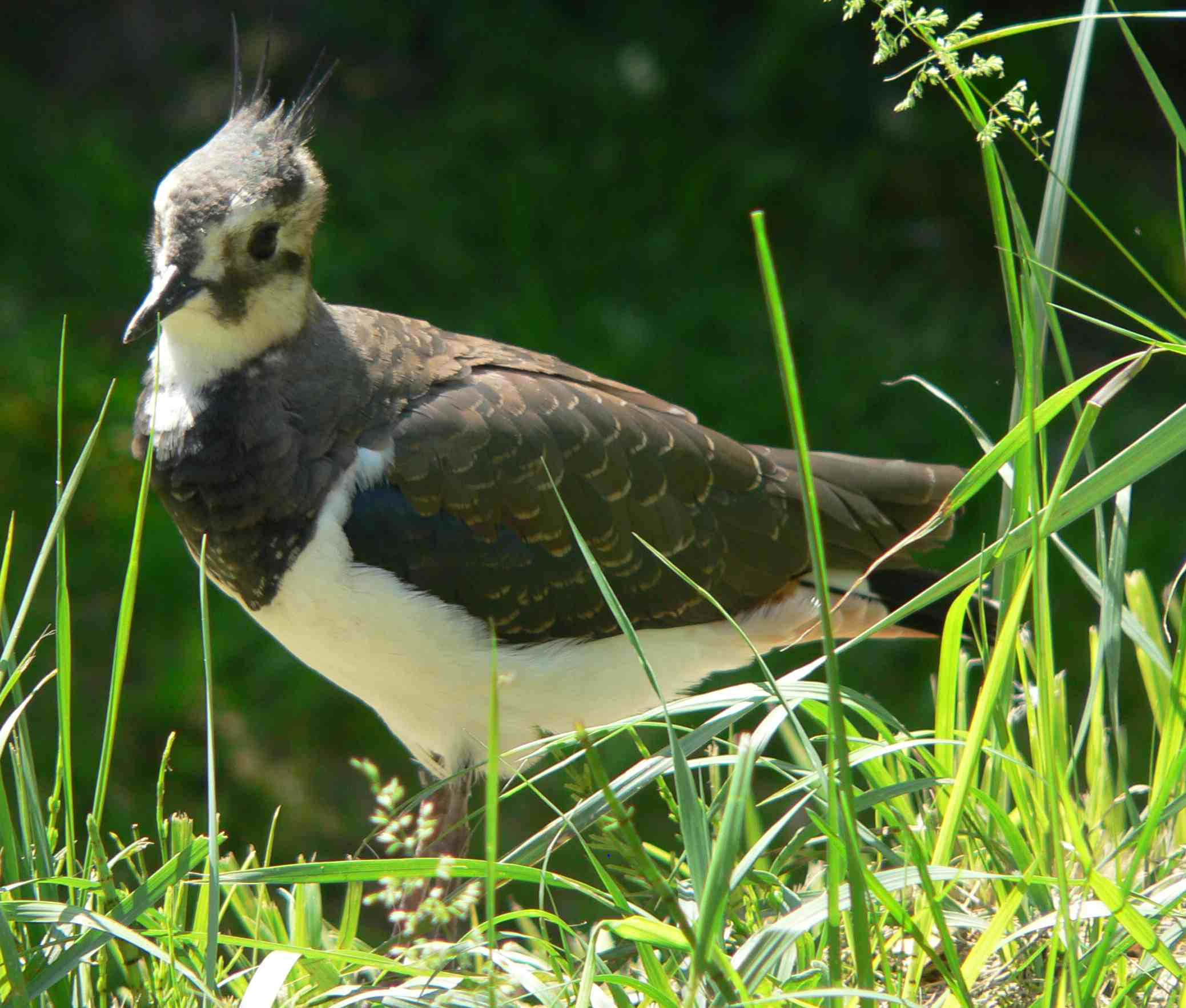 Vanellus vanellus